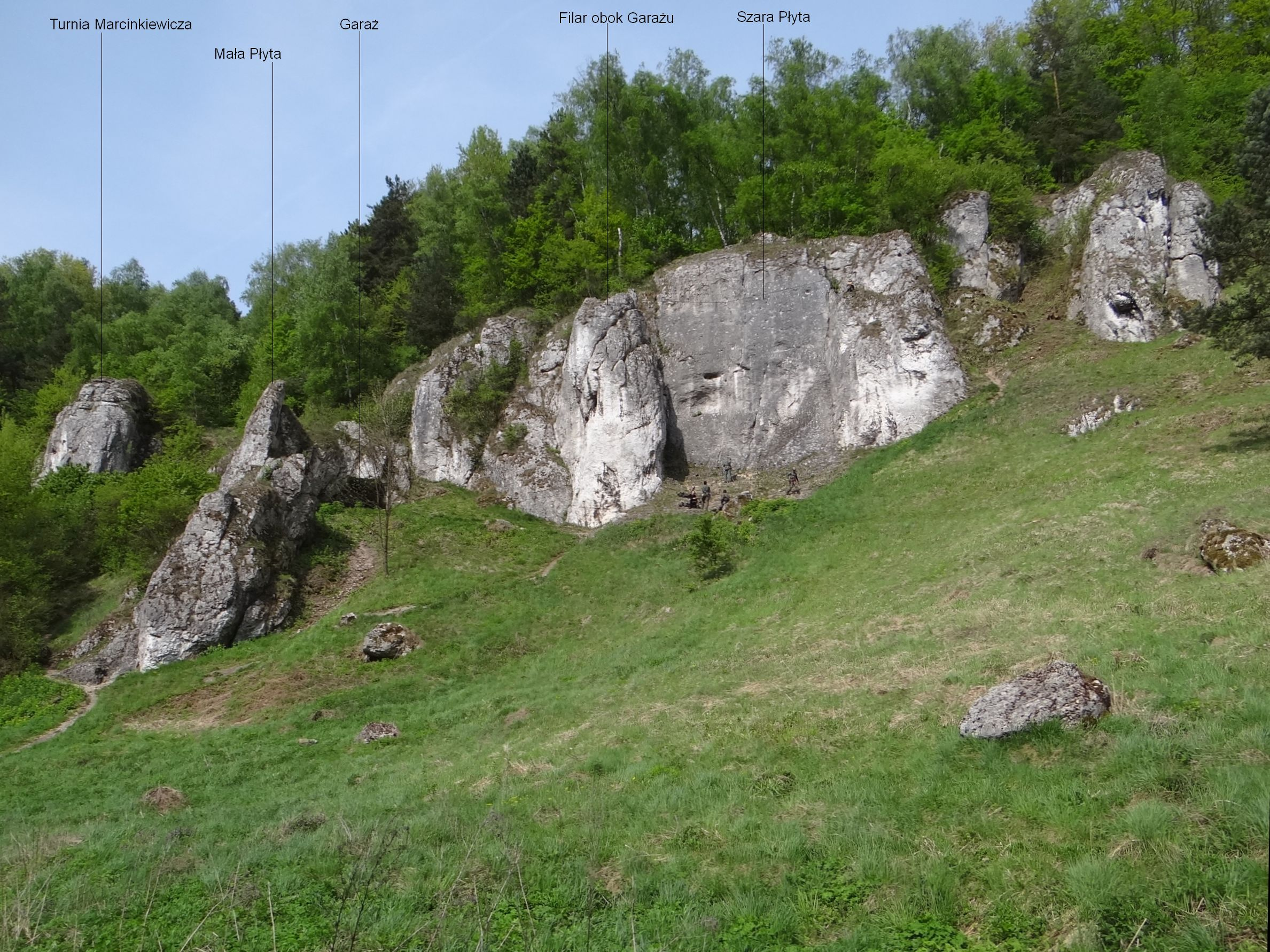 Skały w prawych zboczach dolnej części Doliny Kobylańskiej